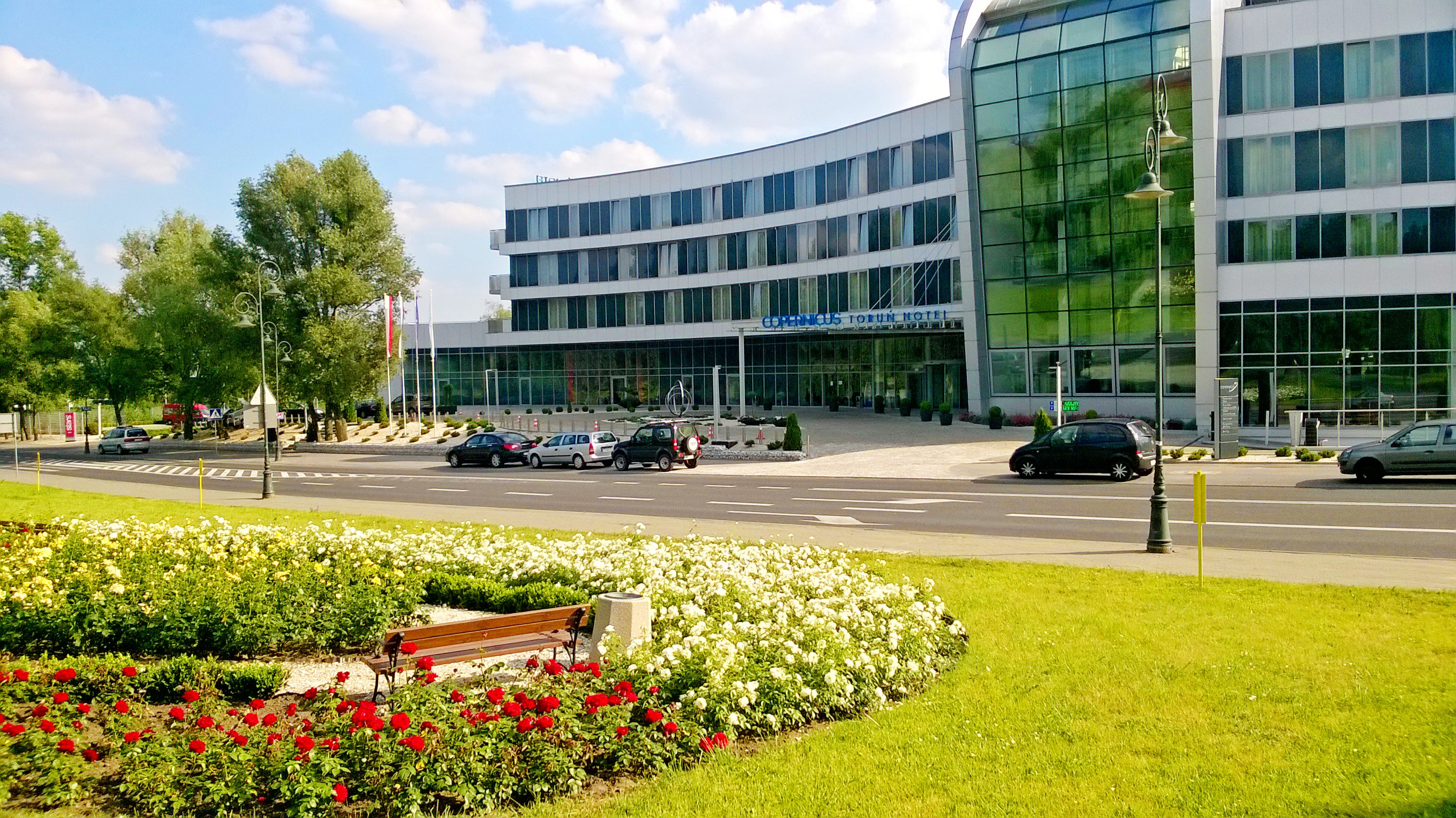 Hotel Copernicus Toruń